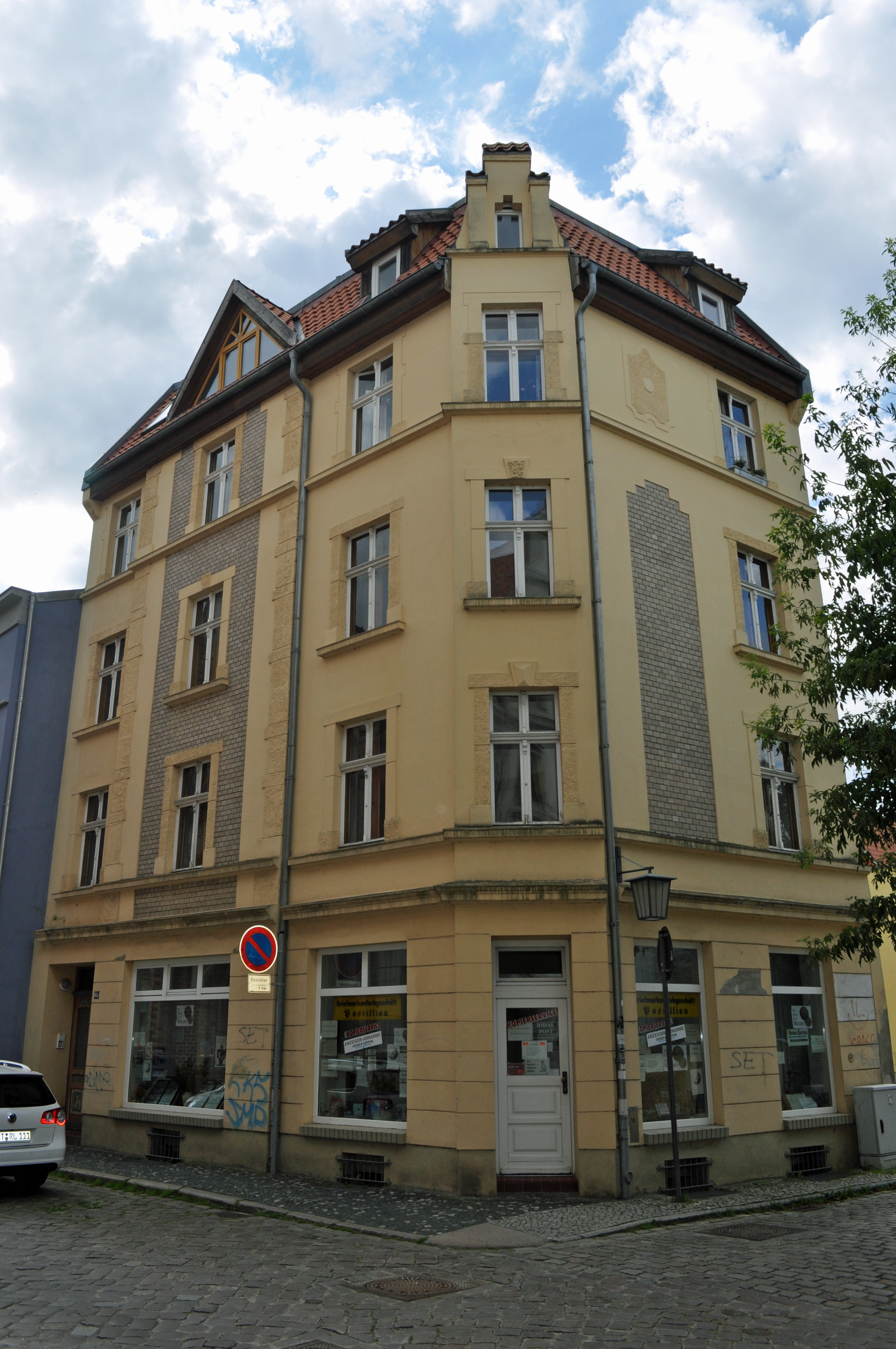 Das Foto zeigt ein Haus (bzw. Details des Hauses) in der Frankenstraße in Stralsund, Deutschland. Die Hausnummer steht im Dateinamen. Aufgenommen am 19. Juli 2011 vom Benutzer:Klugschnacker.